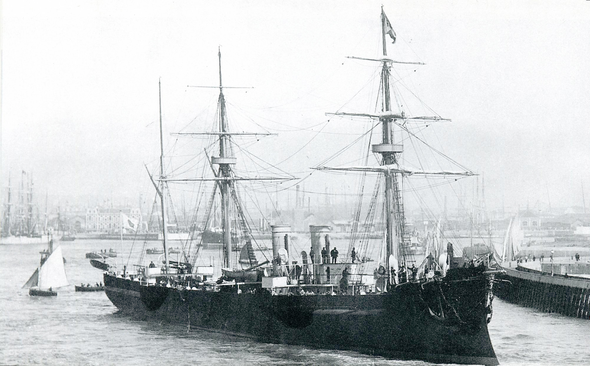 Japanese cruiser Unebi departing Le Havre